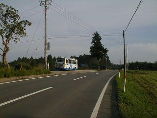 Gunsakai stop of Chiba-chuo bus